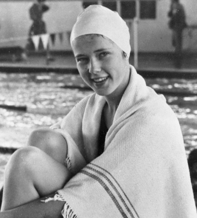 Anita Hellström (Meredith)